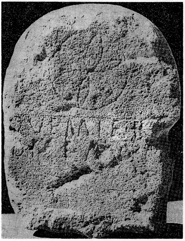 Estela funeraria romana de Quemia, procedente de Monasterio de Rodilla (Burgos, España): Quemi e B[ovdic e] an[orum] XL